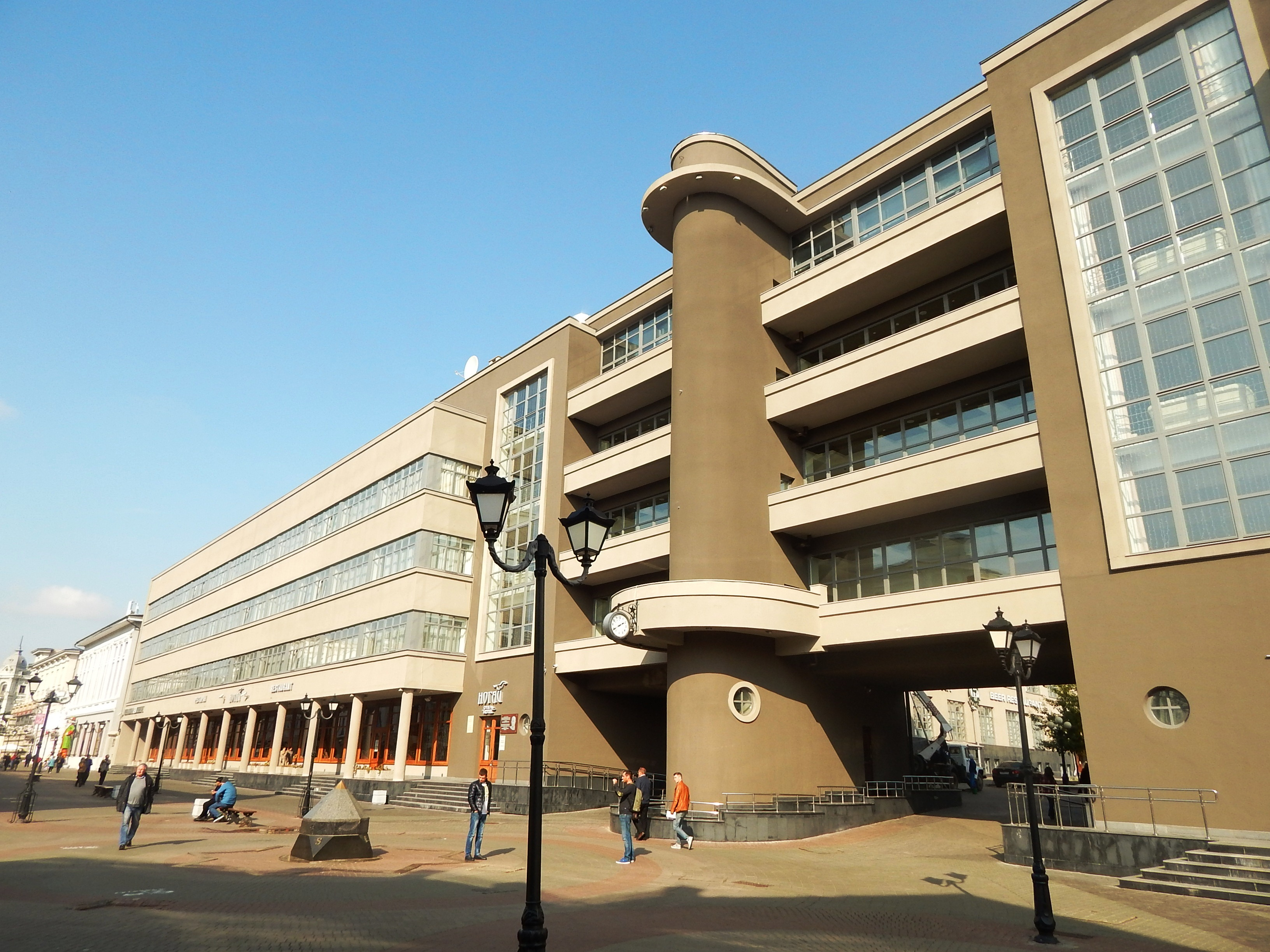 Дом печати: улица Баумана, 19, Казань, Татарстан